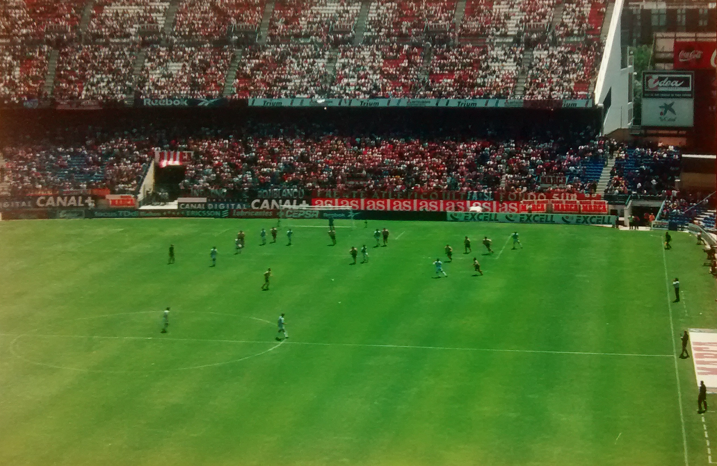 Atlético de Madrid 1:0 Club Deportigo Leganés, 27 de mayo de 2001 (Segunda División de España)